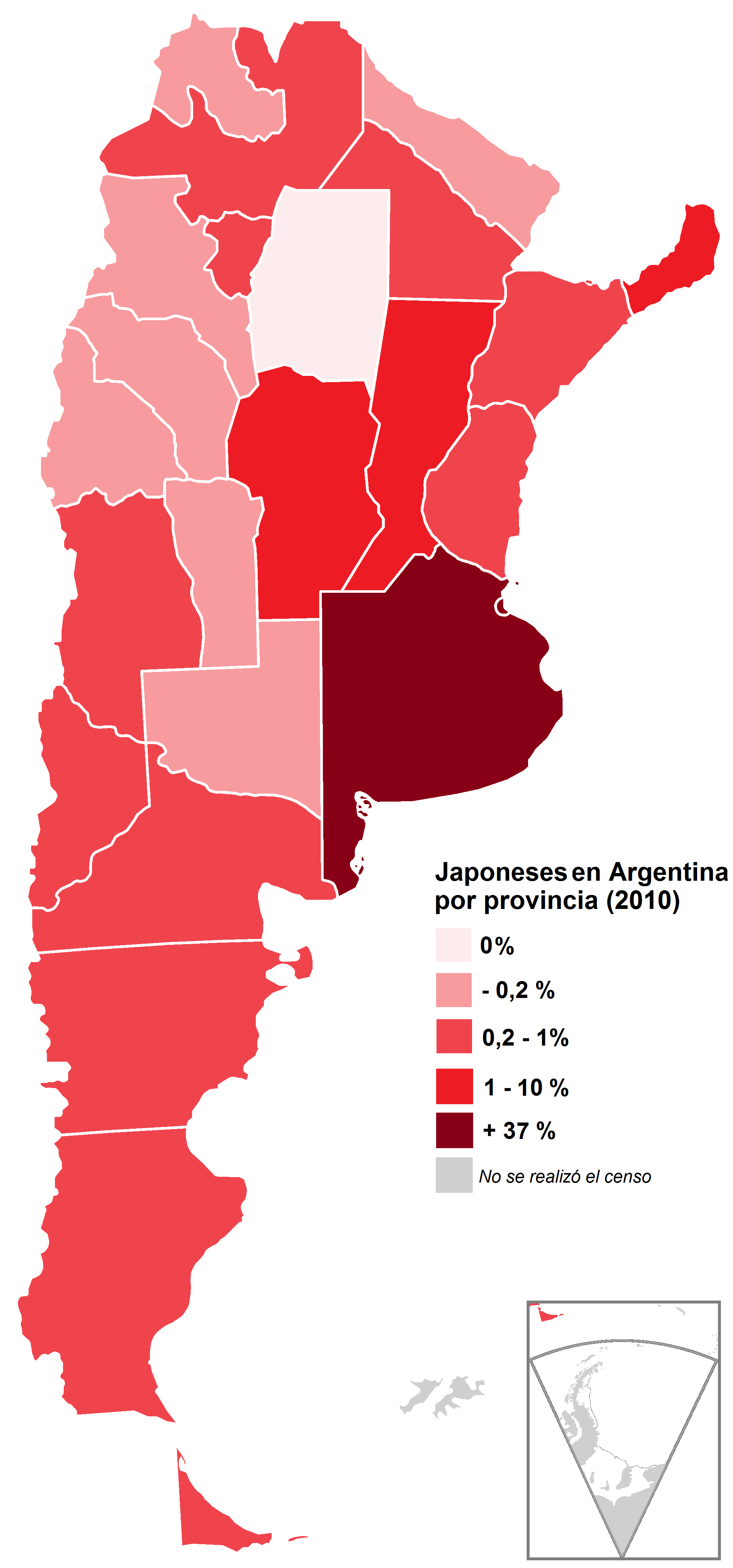 República Argentina por provincia. Población nacida en Japón, en porcentaje. Año 2010. Fuente: Censo 2010 - INDEC.